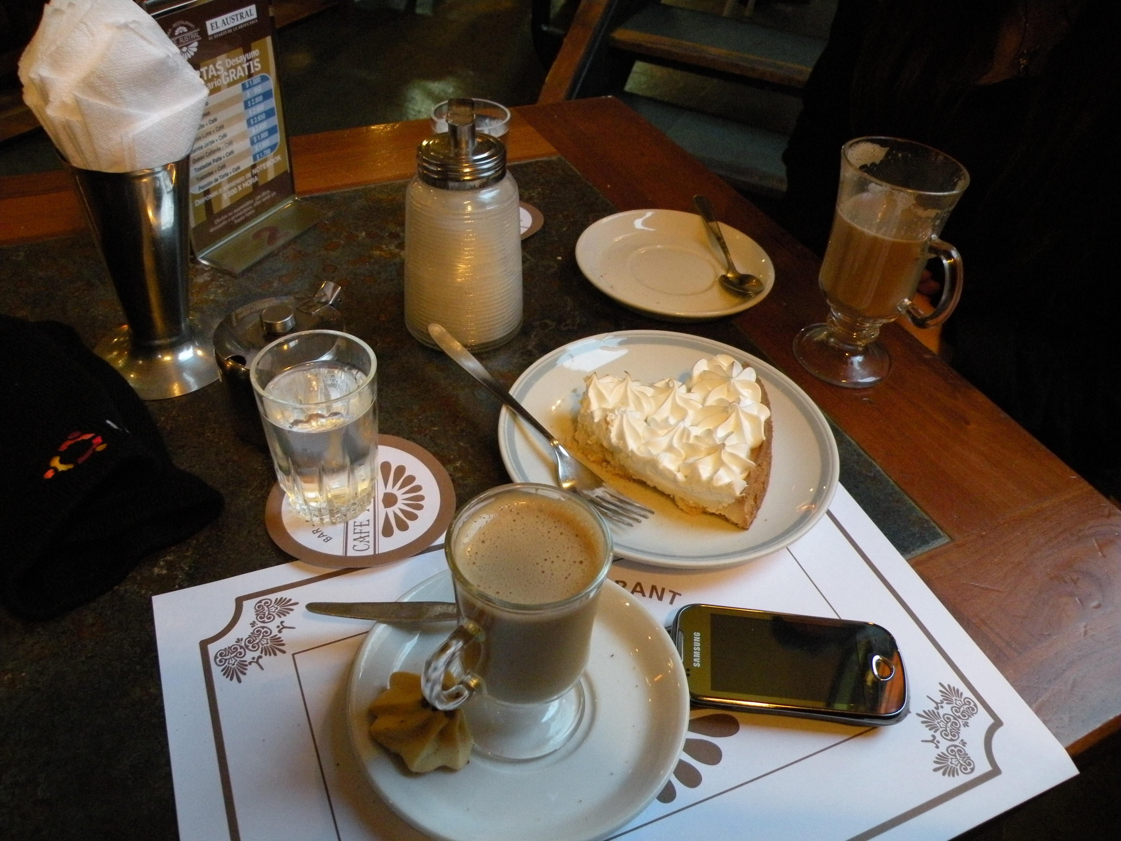 Once en Café Austral